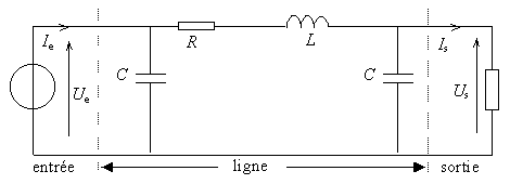 Modèle simplifié d'une ligne électrique. Dessin réalisé pour l'article Ligne à haute tension.